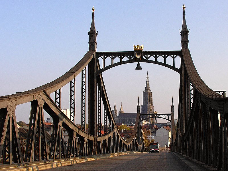 Ulm Neutorbrücke mit dem Ulmer Münster Foto 2007 Wolfgang Pehlemann Wiesbaden PICT3255.jpg